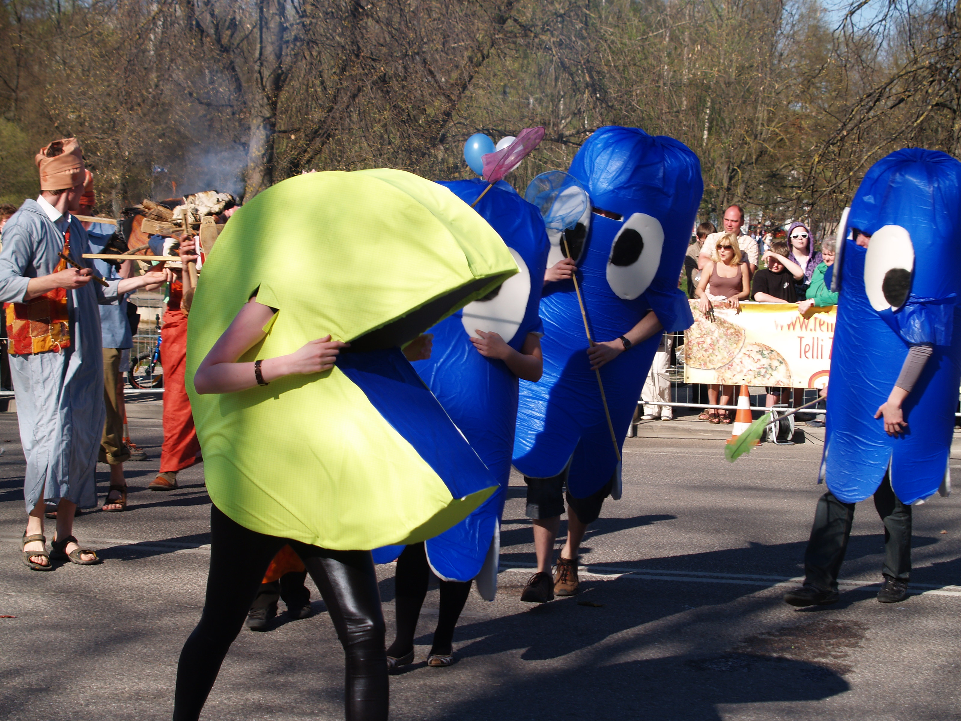 Kostümeeritud teatejooks. Tudengite Kevadpäevad Tartus.